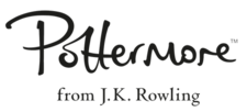 Logotipo do site Pottermore de J.K Rowling